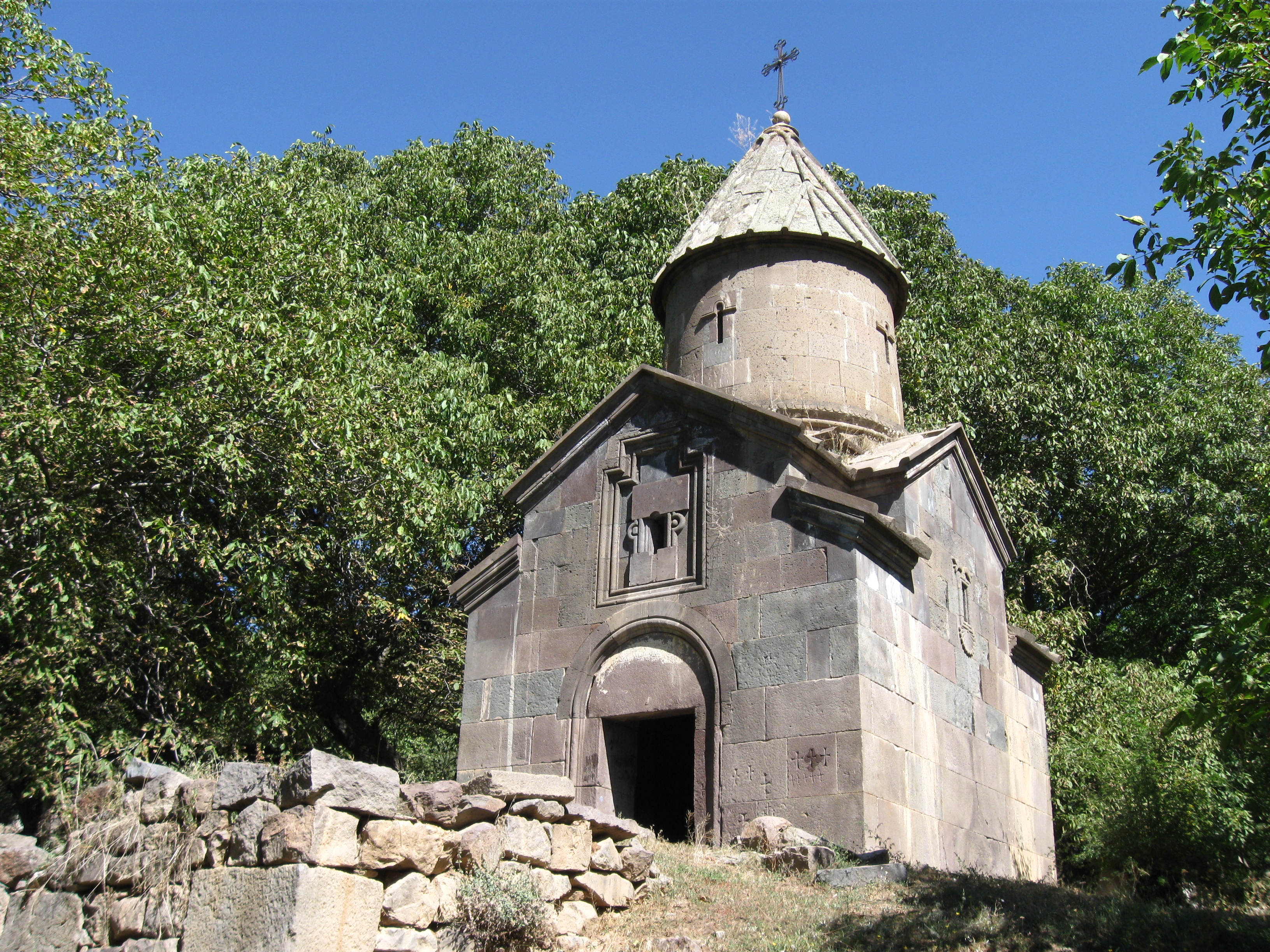 Եղեգիս գյուղում, Վայոց ձոր 21/10